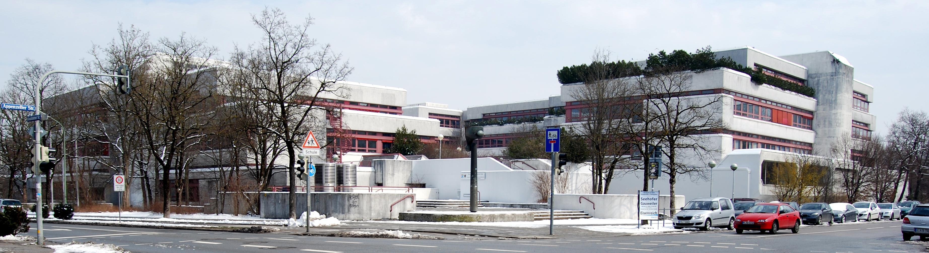 Schulzentrum Fürstenried-West in München, Engadiner Straße 1